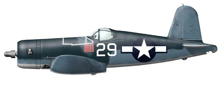 F4U-1A_29_Kepford